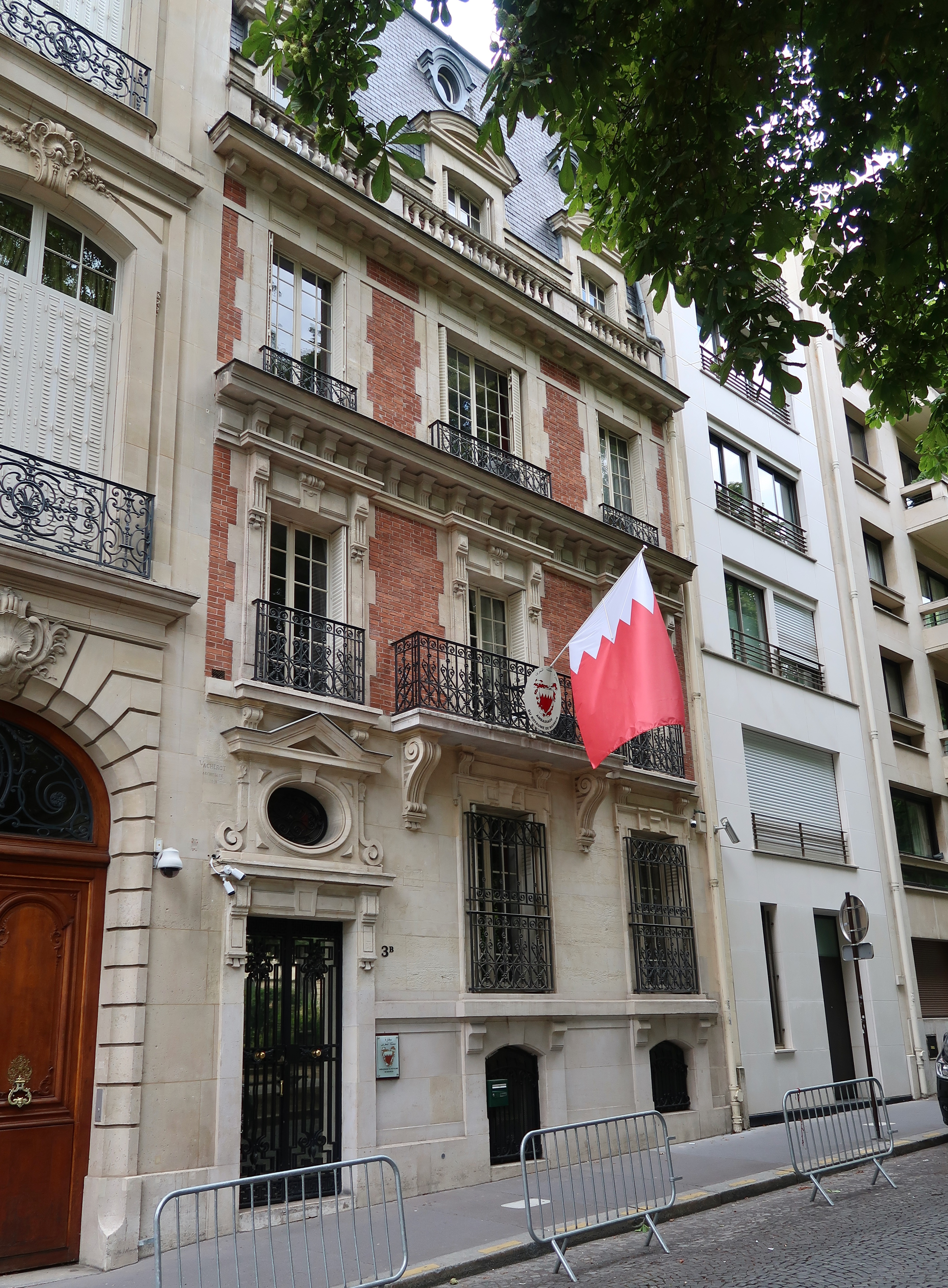 Ambassade de Bahreïn en France, 3 bis place des États-Unis (Paris, 16e).